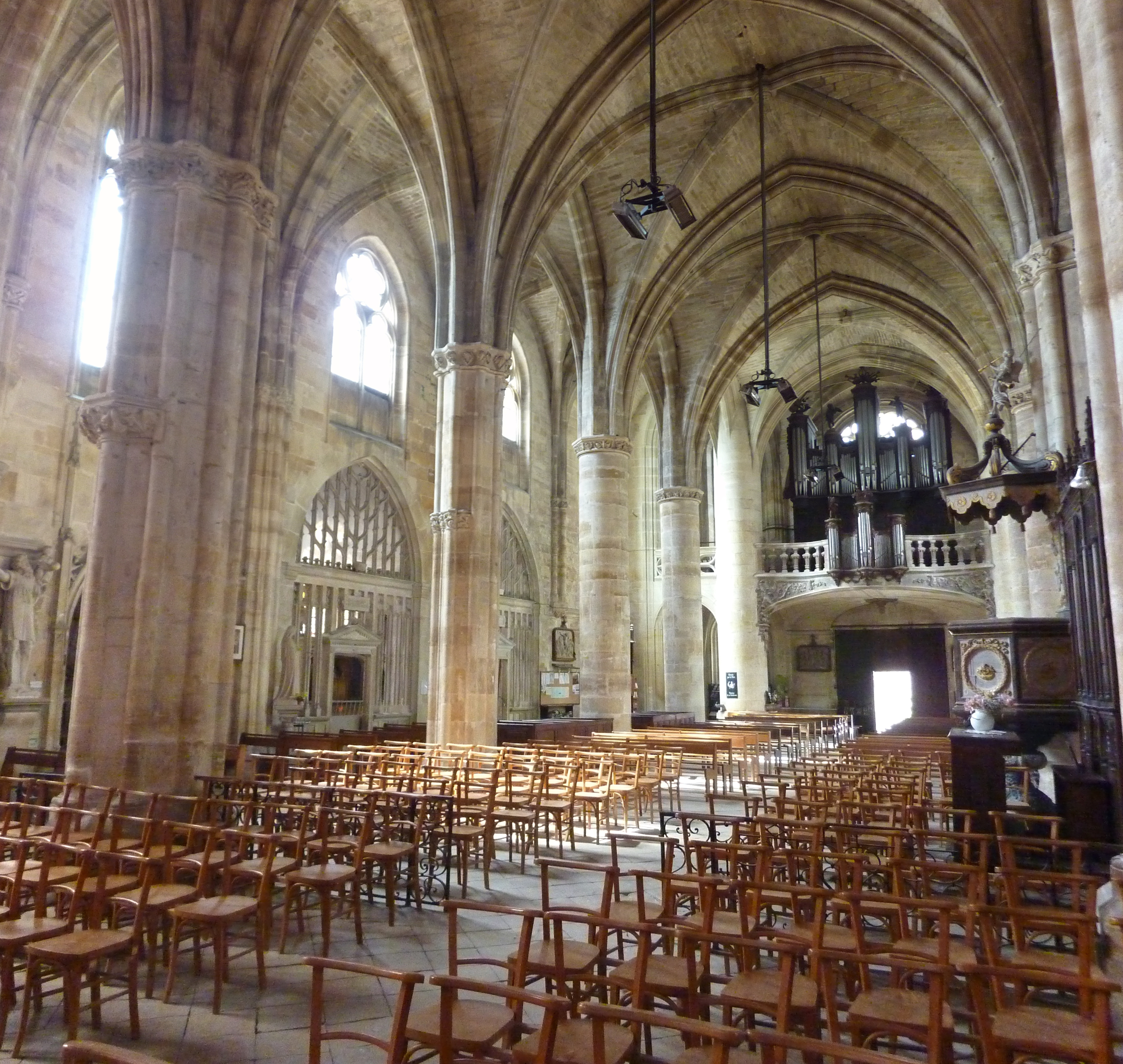 Nef de l'église Saint-Étienne de Bar-le-Duc. En dessous des baies vitrées se trouve la clôture délimitant la chapelle de Stainville.